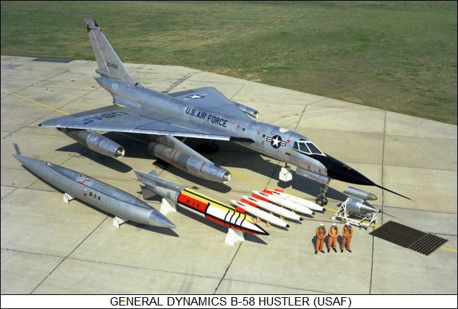 Un Convair B-58 et son équipage exposant sa charge utile, des pods, et des bombes H.